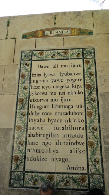 Church of the Pater Noster, Mount of Olives, Jerusalem כנסיית אבינו שבשמים Sanctuary of the Eleona